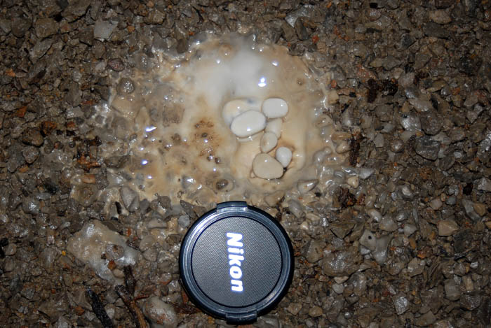 foto: Boštjan Burger (proces nastajanja jamskih biserov)